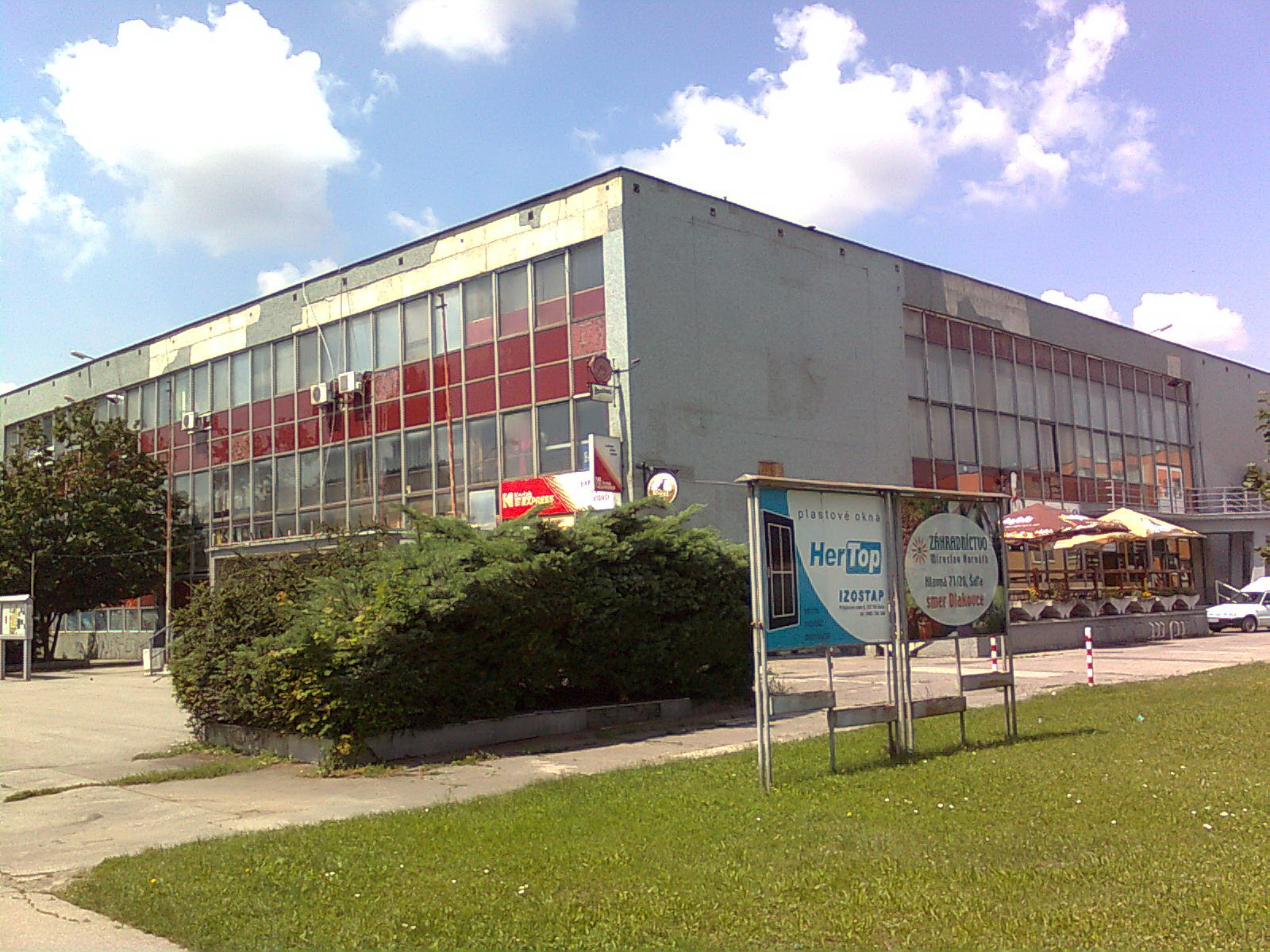 Šaľa - dom kultúry